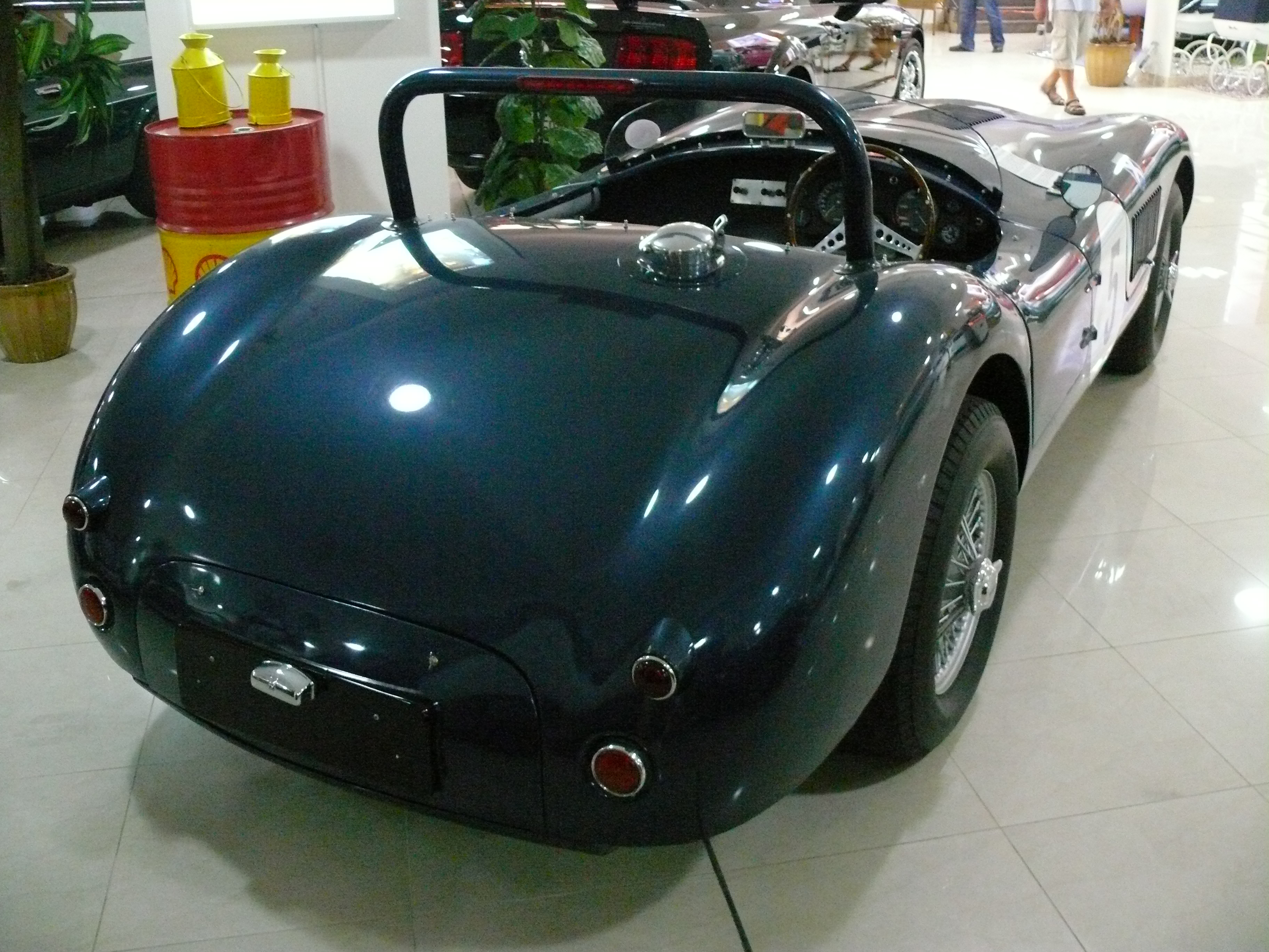 Jaguar XK120C 1955, Malta Classic Car Museum Malta